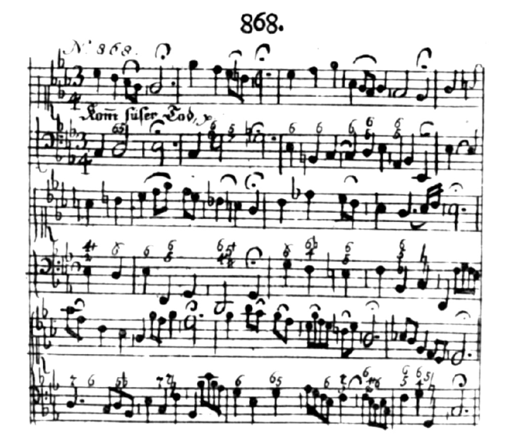 Johann Sebastian Bach: Komm, süßer Tod, Melodie mit beziffertem Bass, in Schemellis Musicalischem Gesangbuch, Leipzig 1736